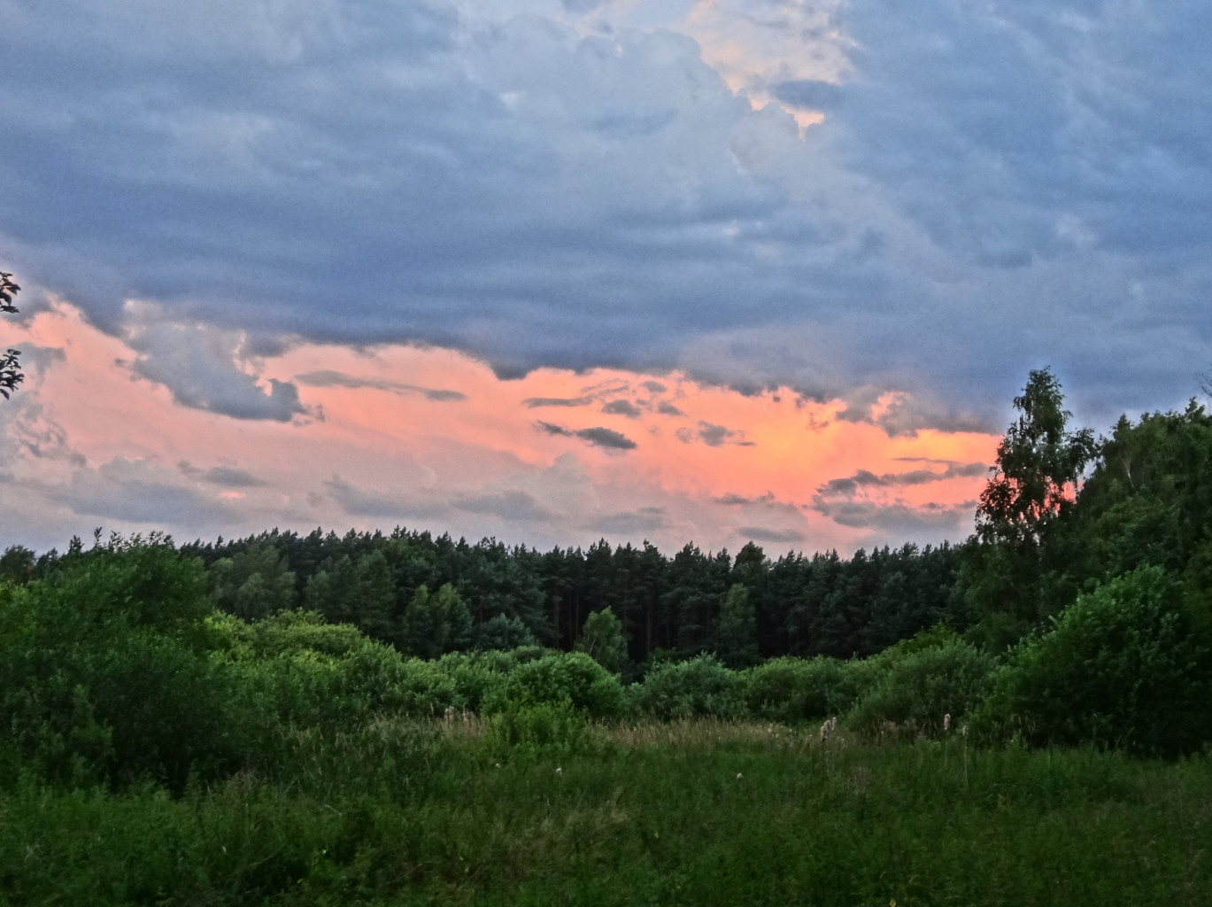 Łąki na południe od miejscowości Białe Błota k. Bydgoszczy